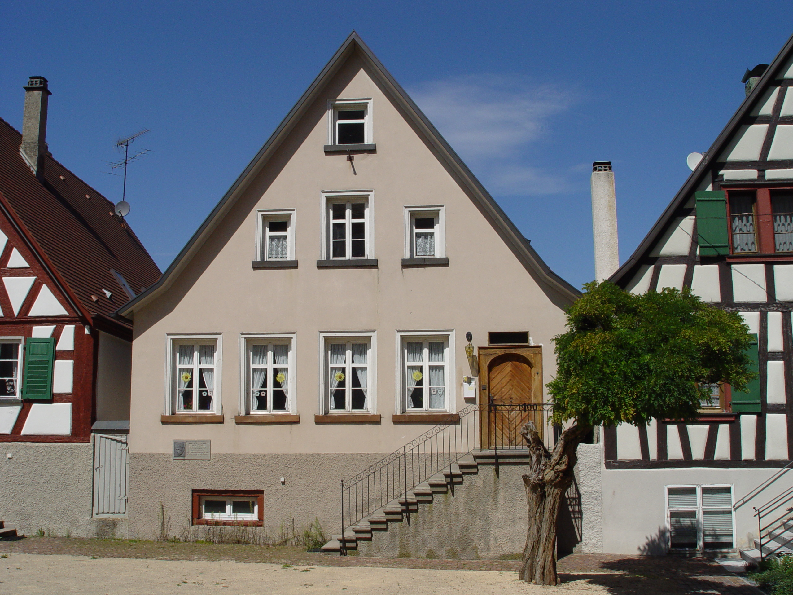 Geburtshaus von Martin Heidegger in Meßkirch, Baden-Württemberg, Deutschland (where Heidegger grew up) - la maison natale d'Heidegger - (ハイデッガーの出生地)